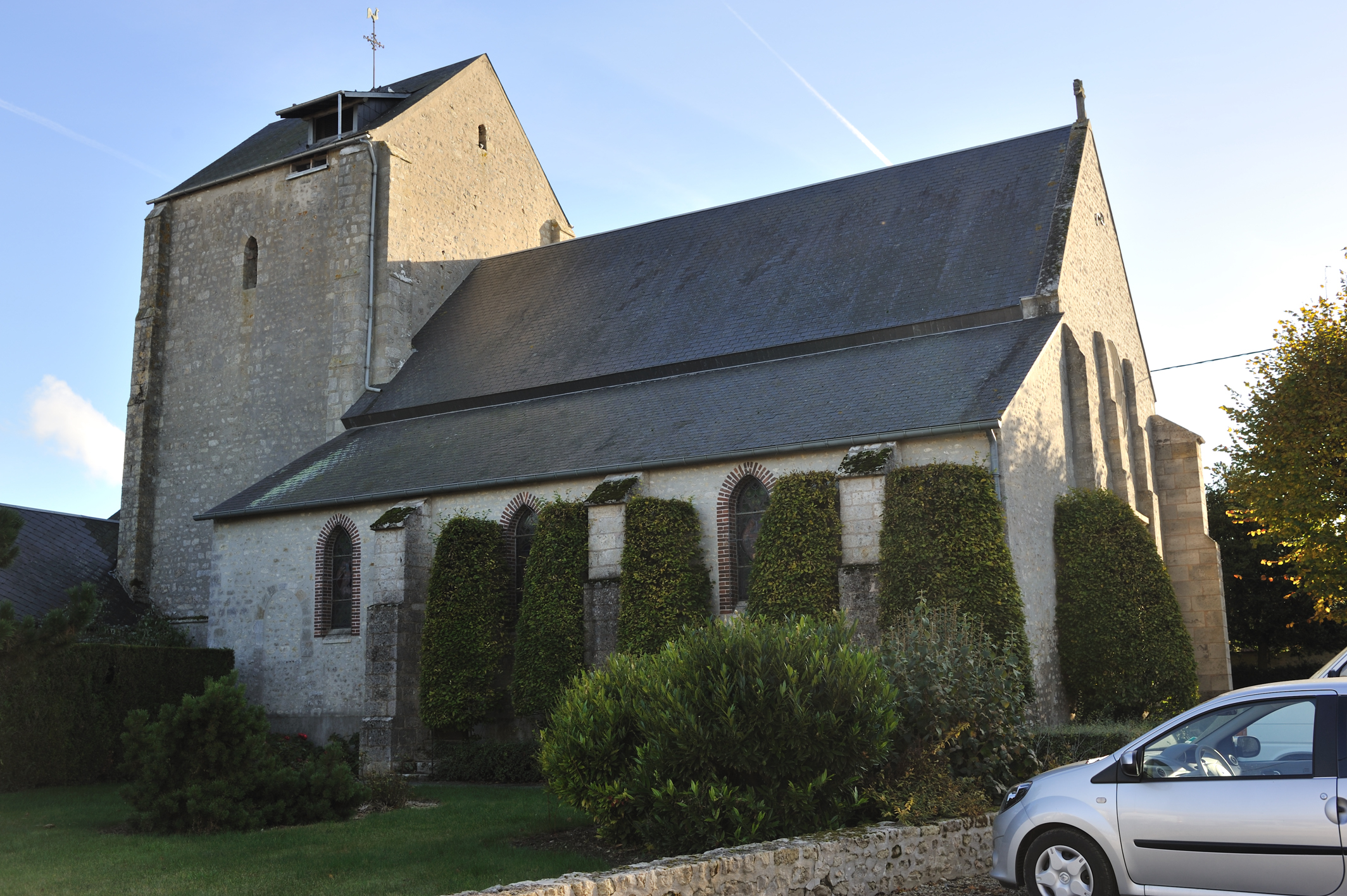 Église Notre-Dame, Charmont-en-Beauce, Loiret, France